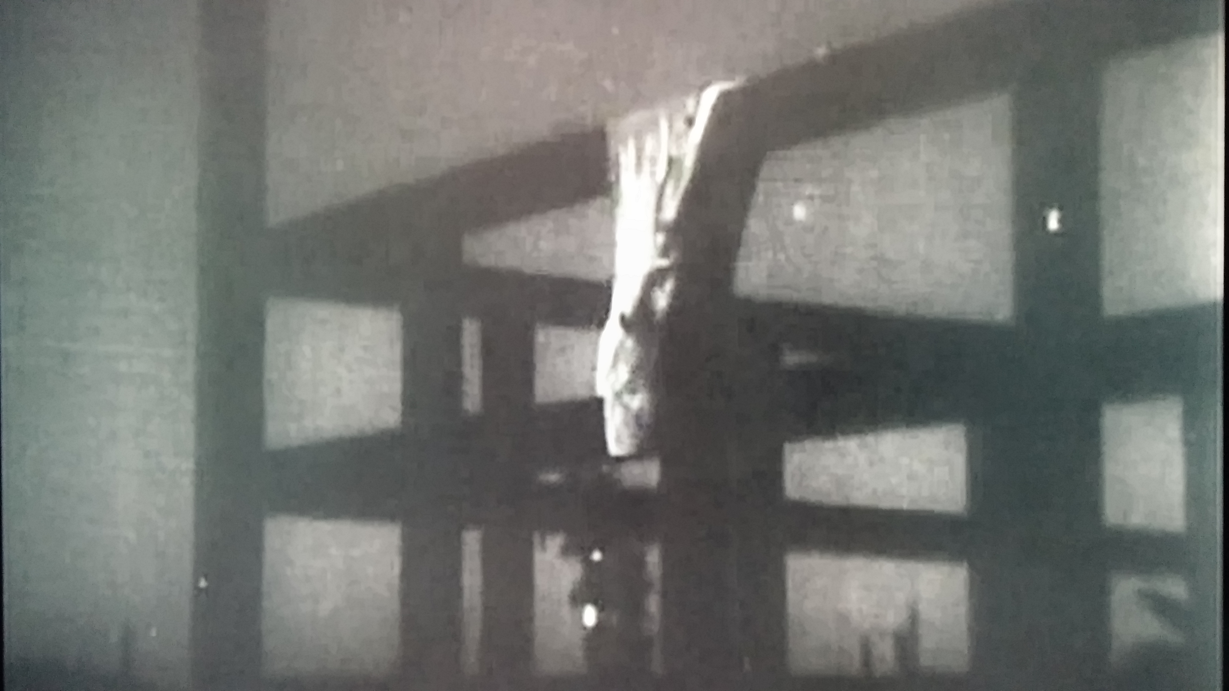 Plano "almohada" primitivo